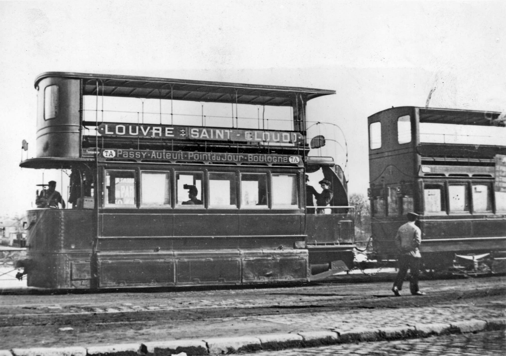 Photographie d'un tramway à impériale, à air comprimé système Mékarski, de la CGO (modèle 1900), ainsi que de sa remorque